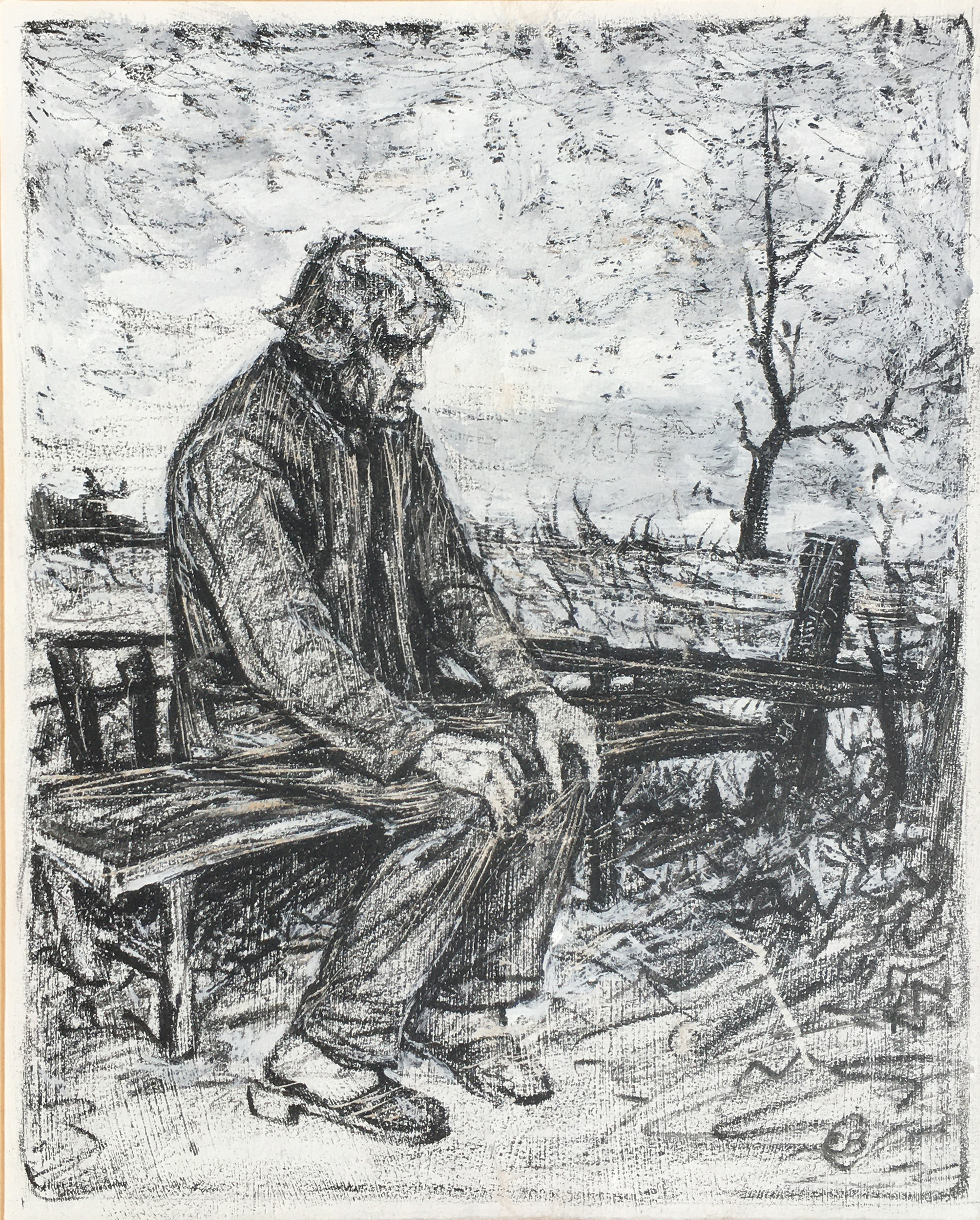 Mit Deckweiß gehöhte Kohlezeichnung, veröffentlicht in N° der Künsterblätter zum Krieg 1914 »Wachtfeuer«- Das Bild kostete damals 60 Mark. Mein Großvater Wilhelm Wewel schenkte es 1914 meinem Vater Erich Wewel als er damals die Einberufung zum Wehdienst erwartete. Er hat es mir vererbst und es ist in meinem Besitz.